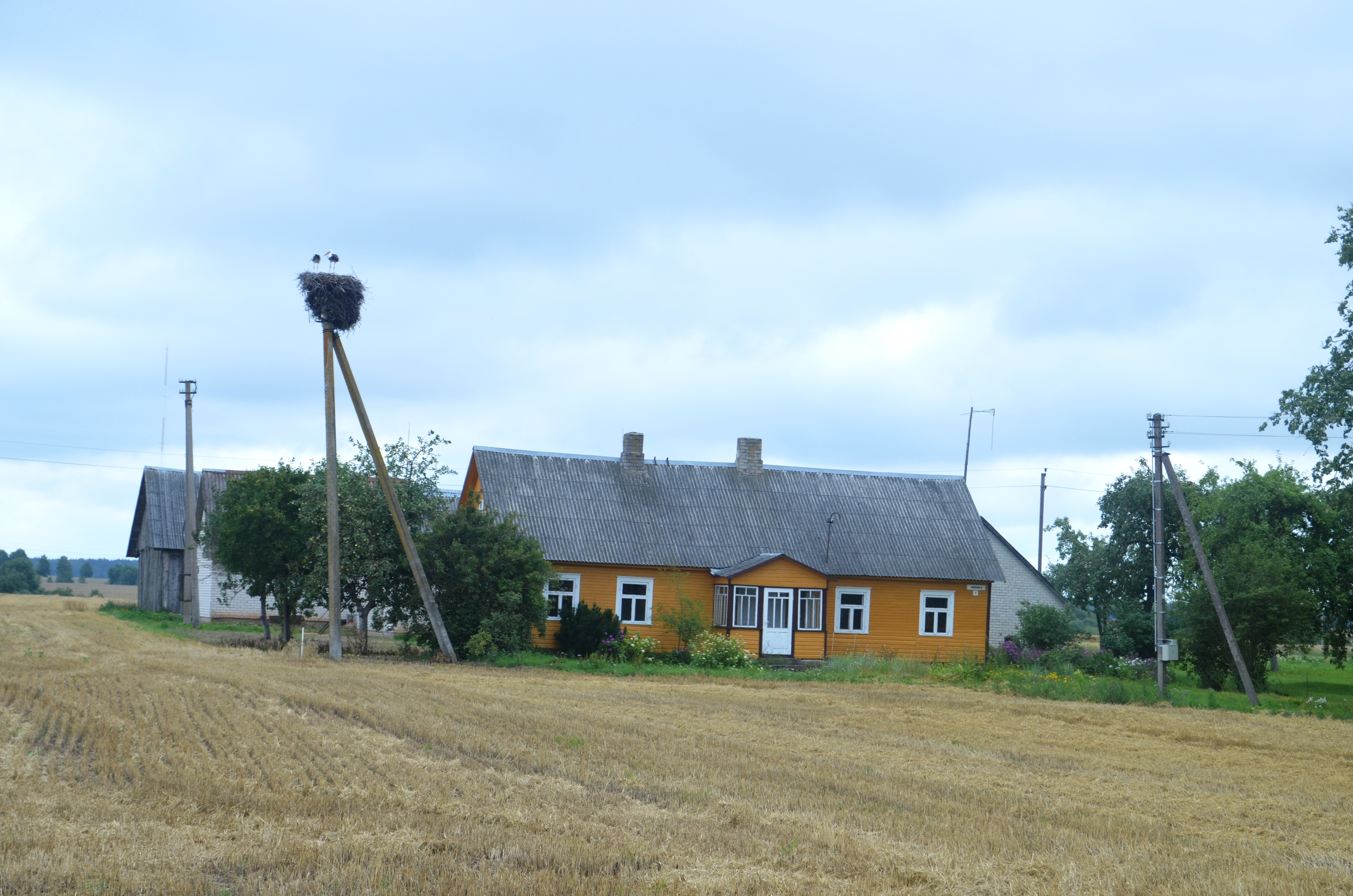 Dargužiai, Jonavos raj.